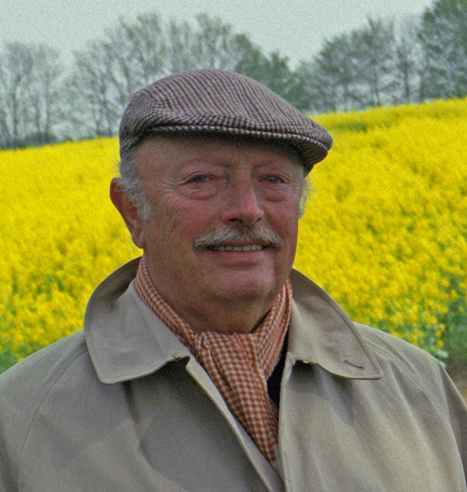 Porträt Filmproduzent Gyula Trebitsch